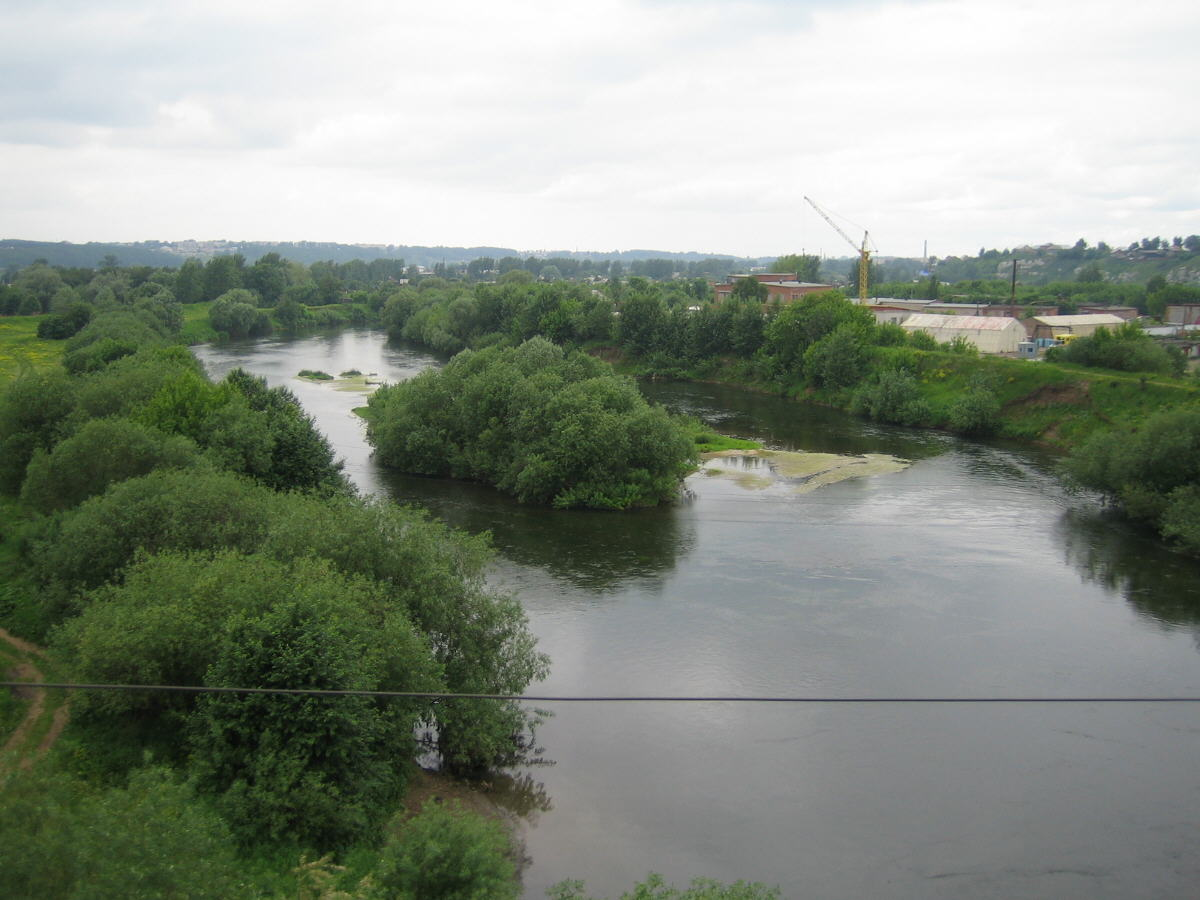 г. Кунгур, р. Ирень (11.06.2006)